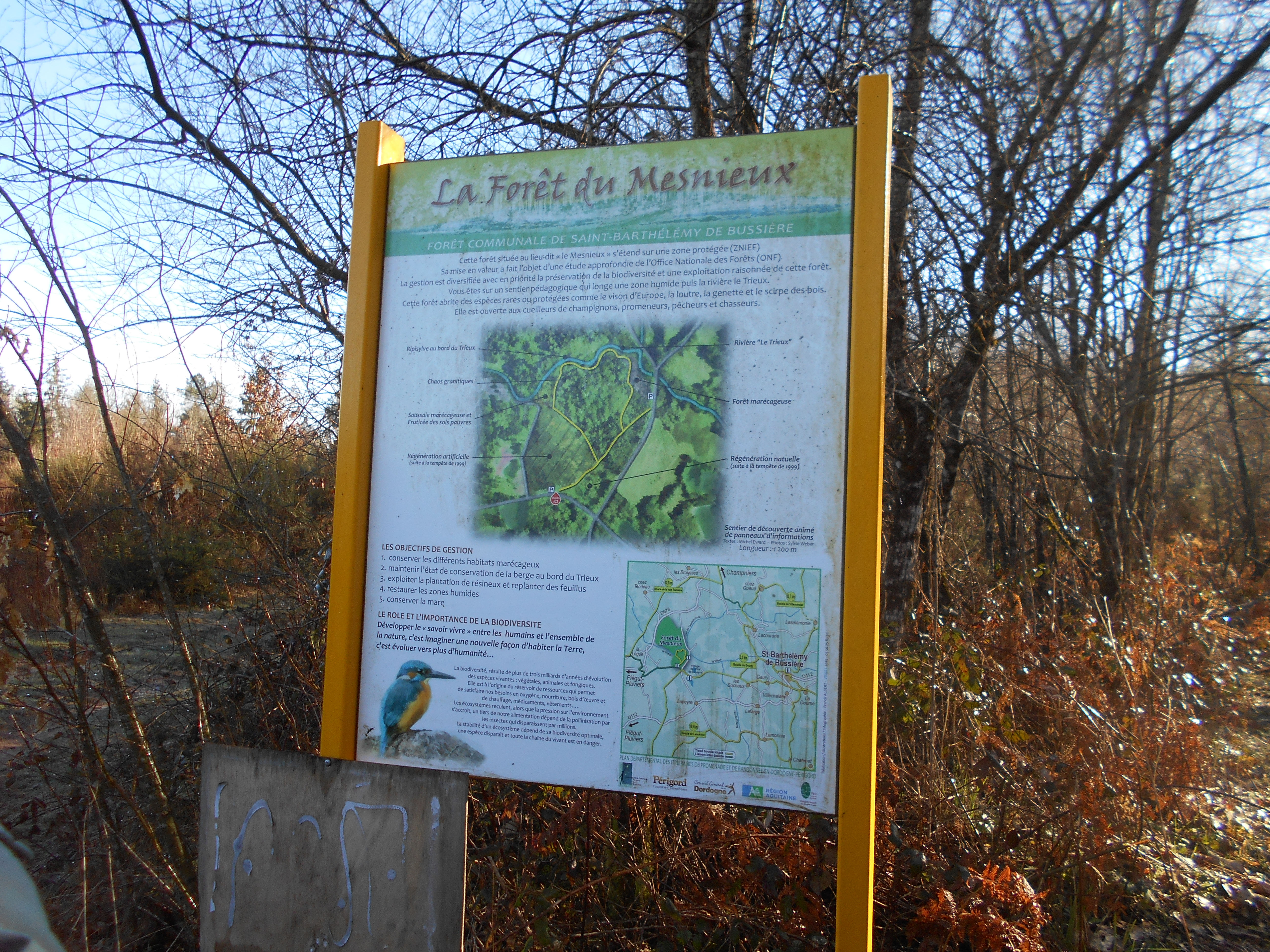 La Forêt du Mesnieux sur la commune de Saint-Barthélemy-de-Bussière, Dordogne, France